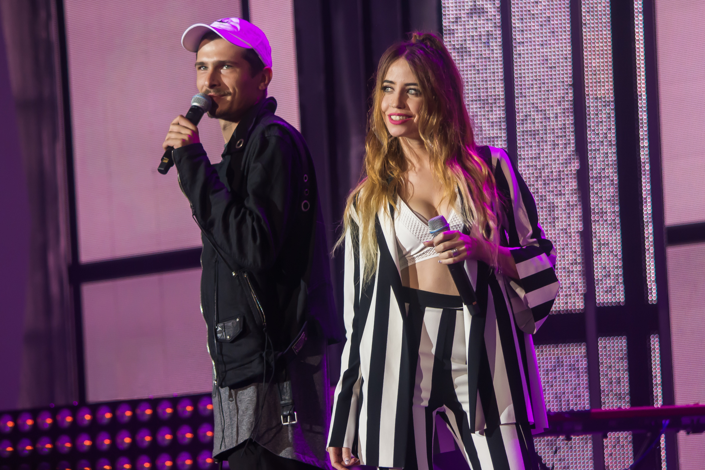 Группа "Время и стекло" на Europa Plus TV. Hit Non Stop в Витебске 2016